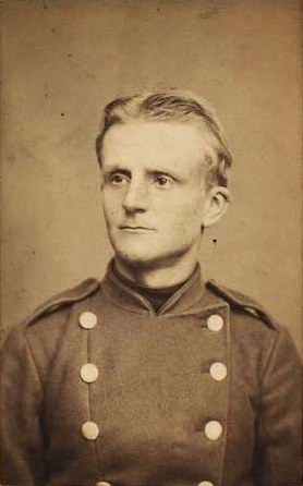 Valdemar Stephan Julius Raabye (1852-1908), Danish general